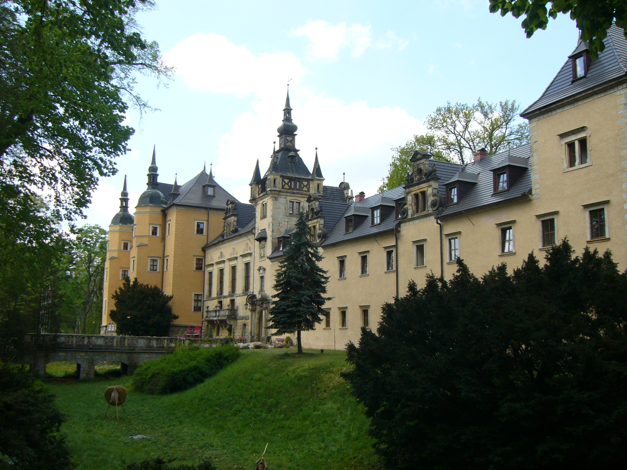 Zamek "Klliczków" w Kliczkowie, powiat bolesławiecki, woj. dolnośląskie. Widok prawego narożnika i wejścia głównego.